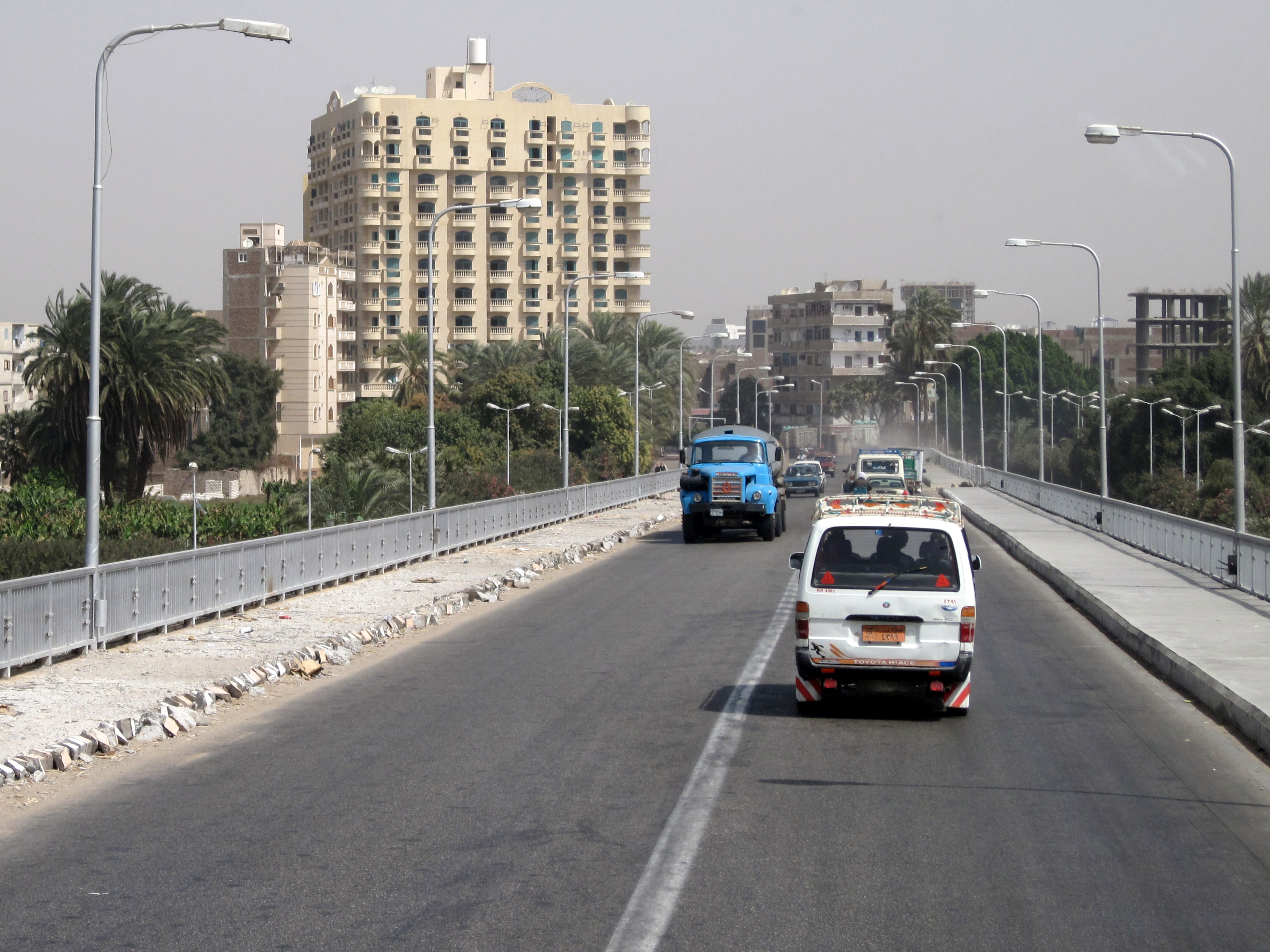 Straßenbrücke über den Nil in Qina, Ägypten